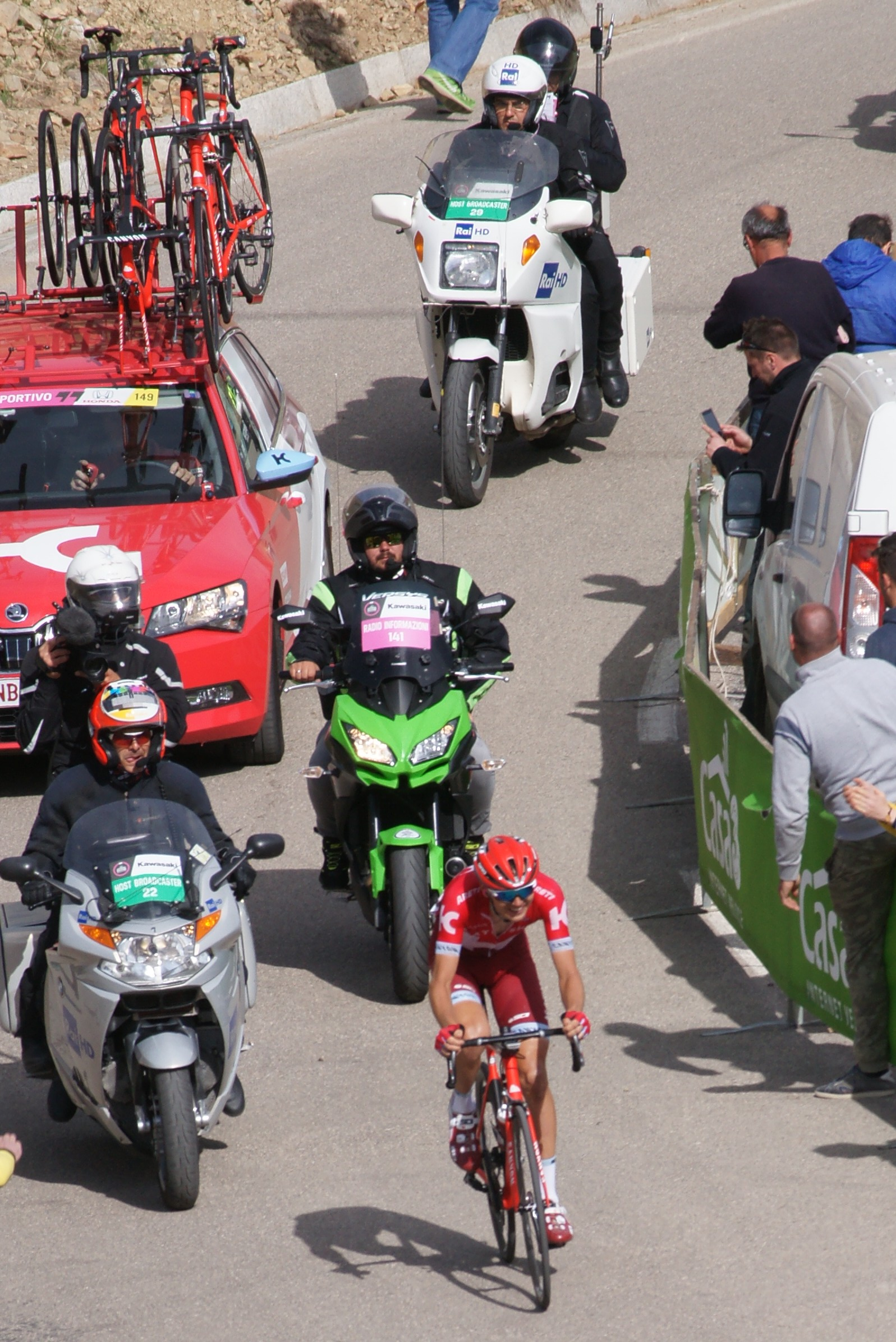 Rein Taaramäe, étape 20 col de la Lombarde Giro 2016